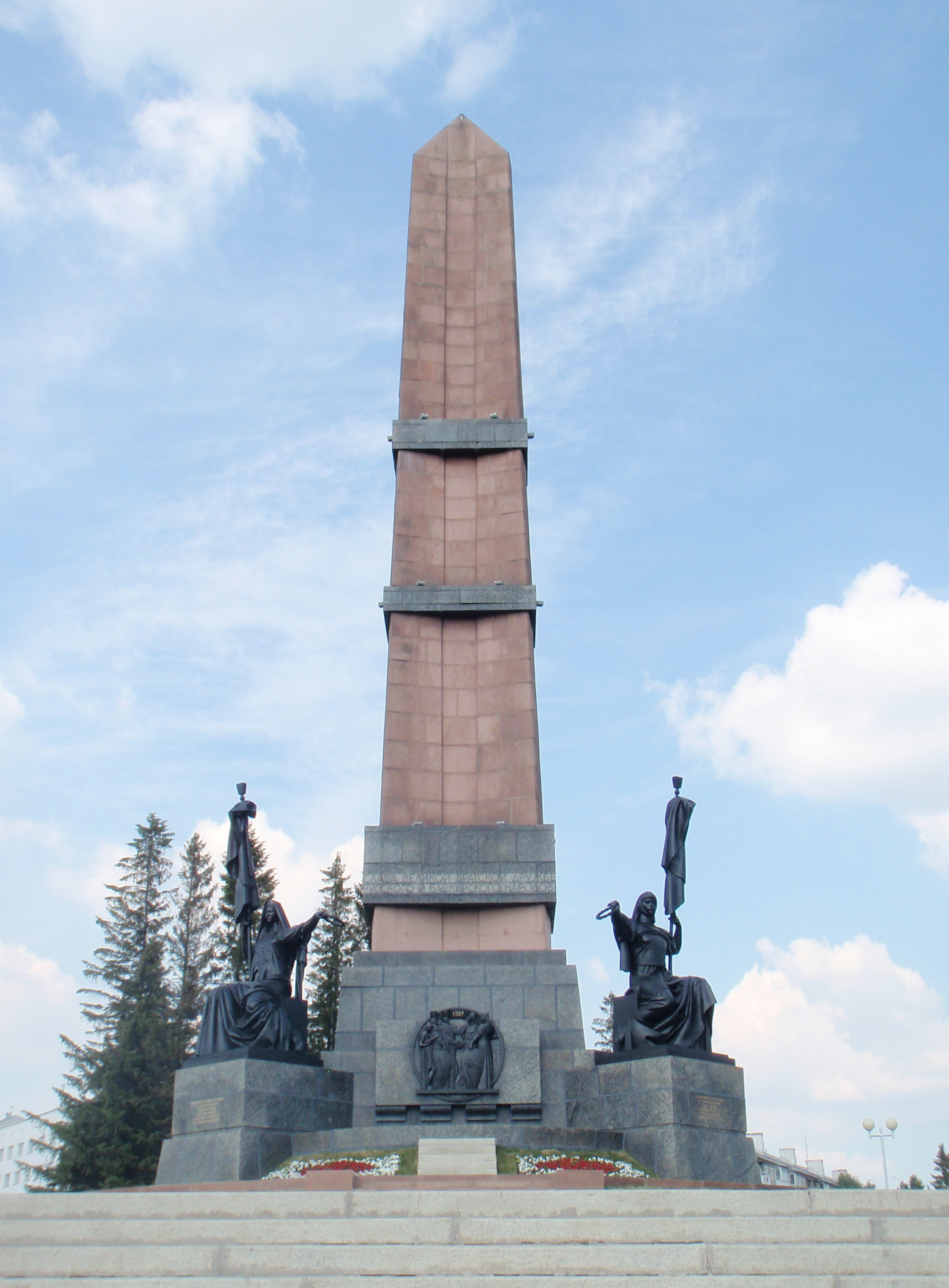 Монумент дружбы в городе Уфа посвящён 400-летию присоединения Башкирии к России, возведен на Троицкой горе, где по указу Русского Царя Ивана Грозного в 1557 году была построена деревянная Уфимская крепость со Спасской башней. Монумент символизирует Дружбу русского и башкирского народа. Авторами памятника являются московские скульпторы М. Бабурин и Г. Левицкая, архитекторы Е. Кутырев и Г. Гаврилов. Скульптуры отлиты на ленинградском заводе «Монумент-скульптура».